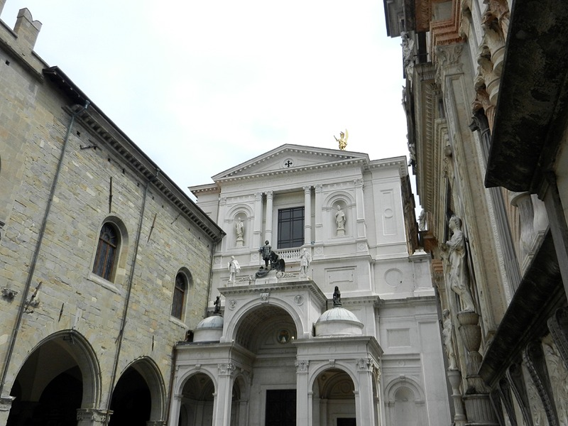 Bergamo - Duomo